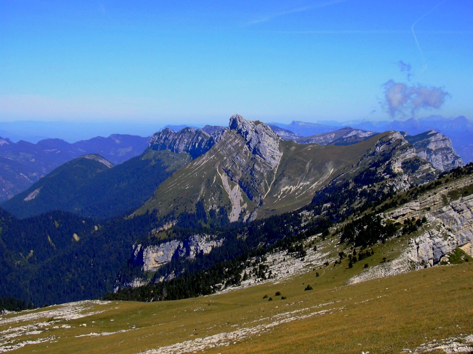 Les Lances de Mallissard et le Col de Bellefond vus depuis le sommet de la Dent de Crolles.